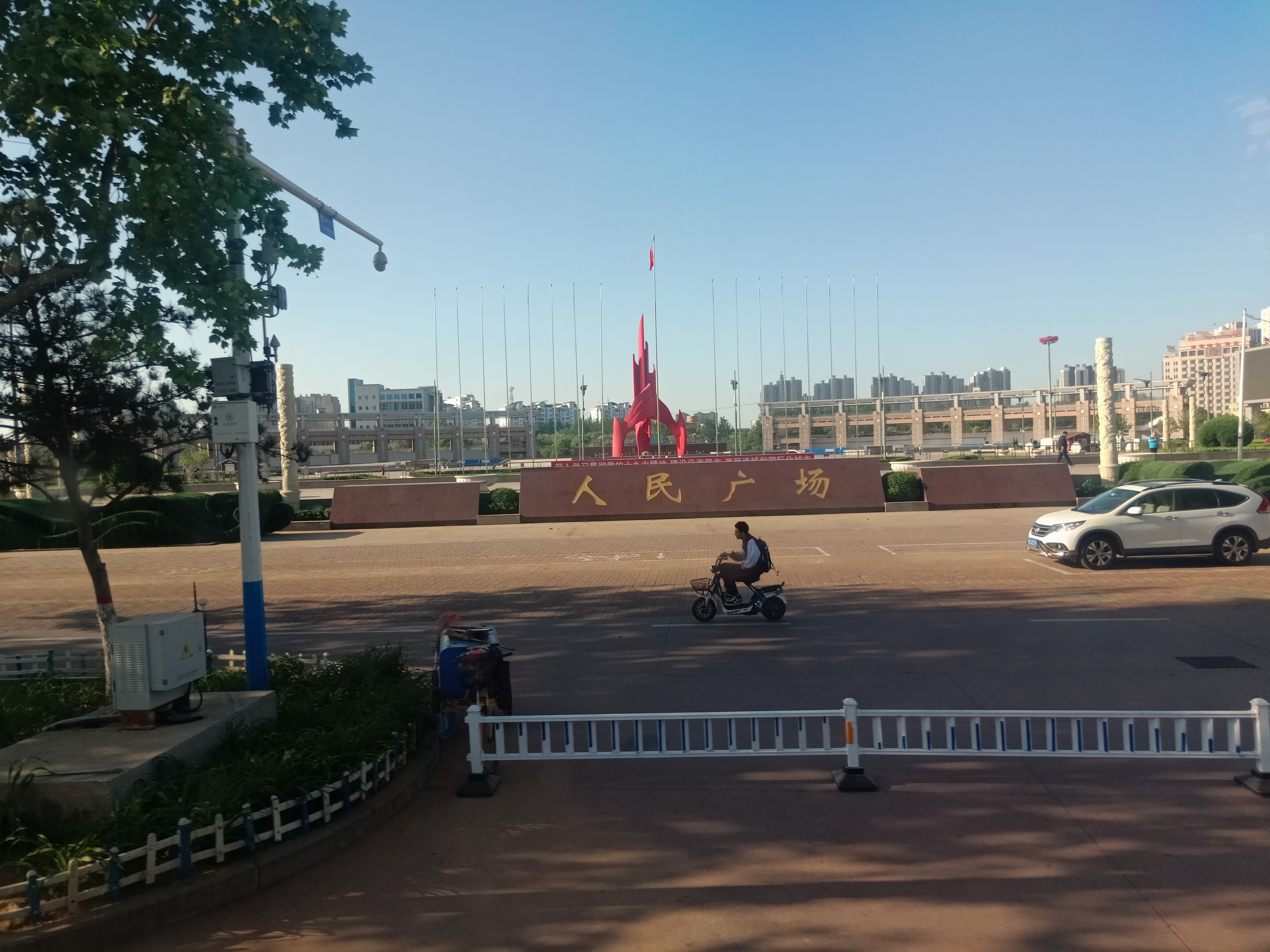 粵語: 秦皇島人民廣場